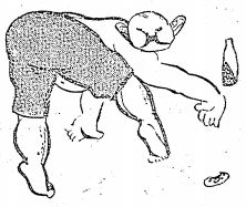 東京漫画会主催の第一回漫画祭で踊り狂うw:ja:平福百穂